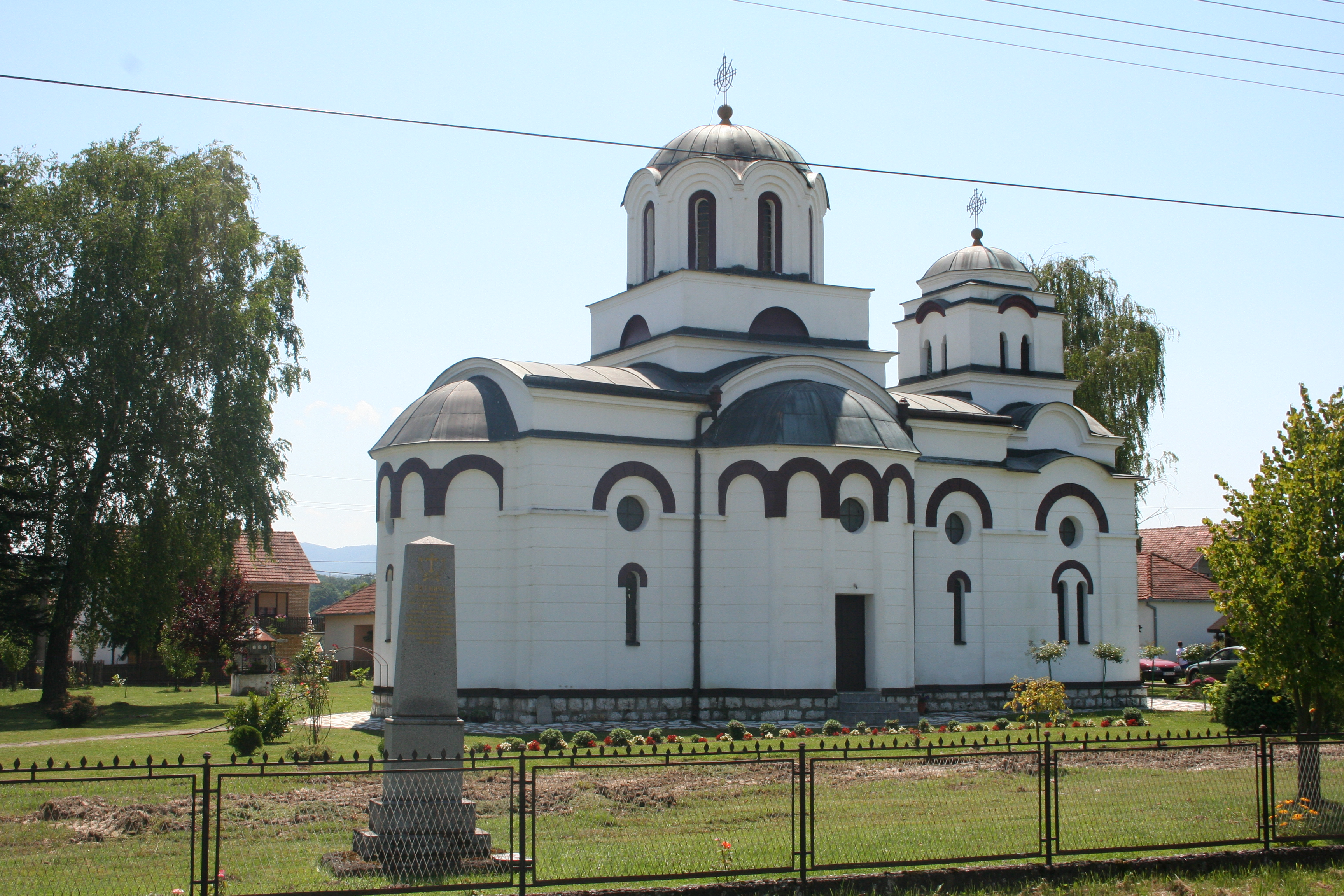 Crkva Sv. Jovana Bogoslova, Brezjak